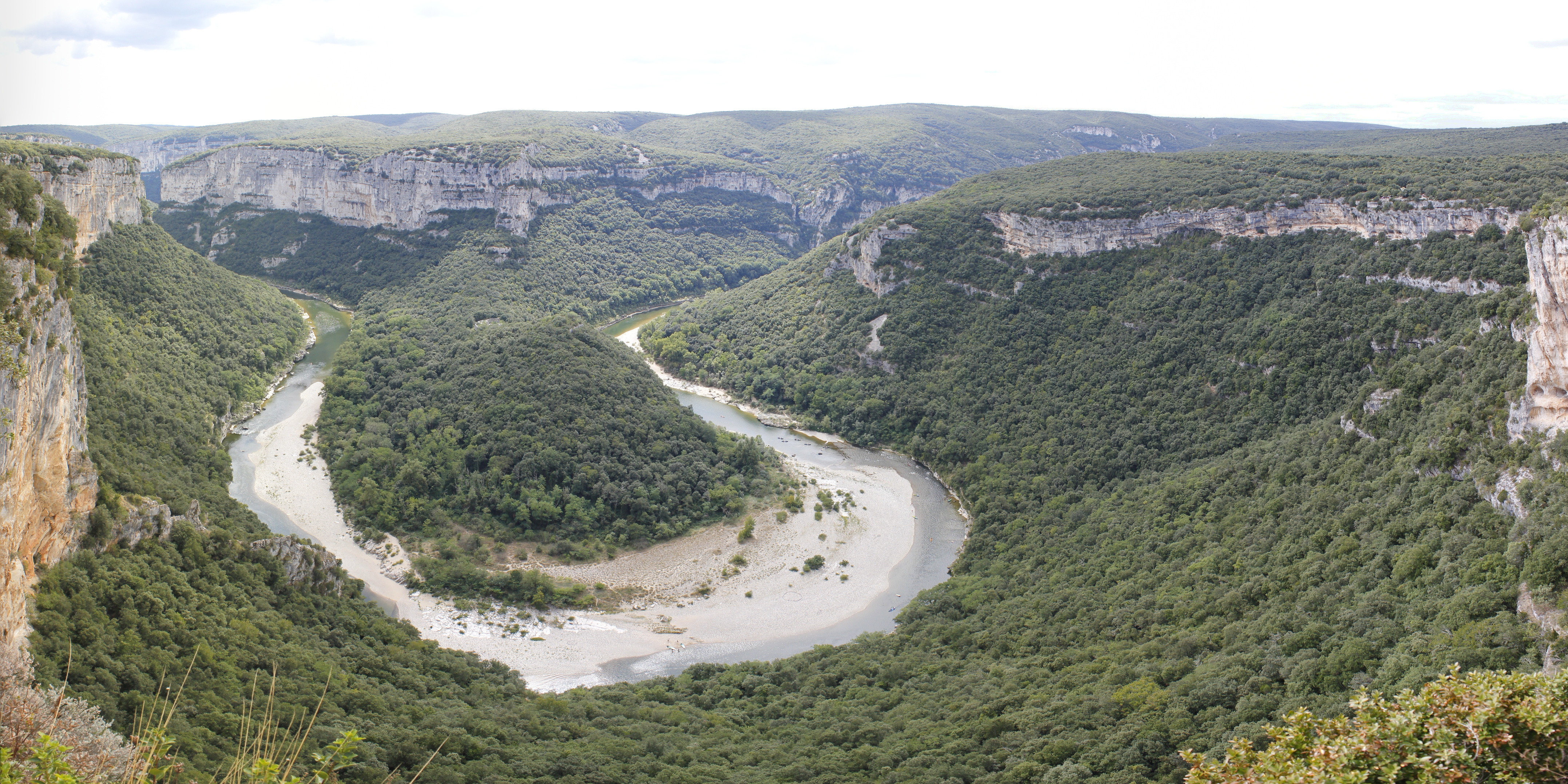 Dans les gorges de l'Ardèche, une boucle de la rivière